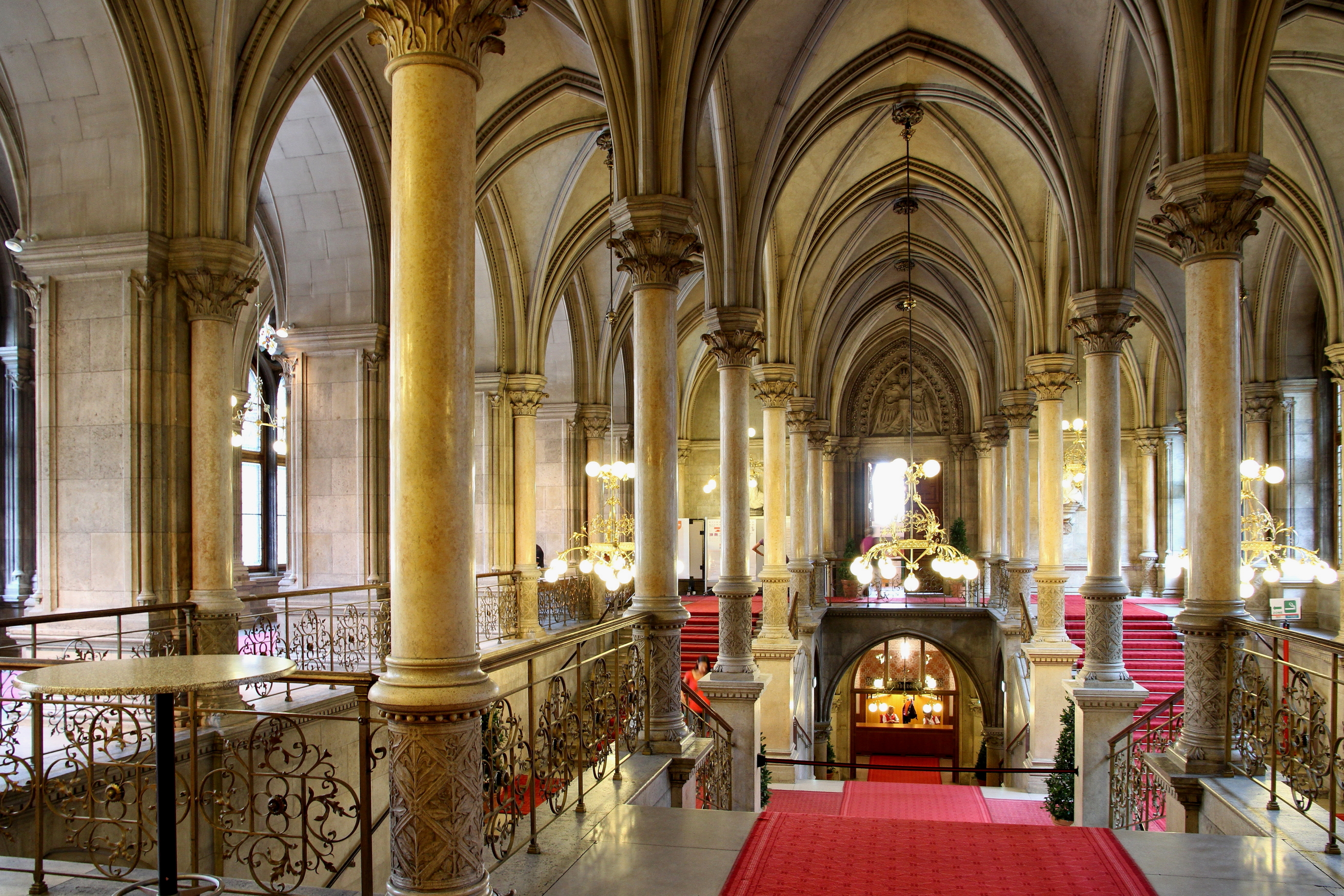 Feststiege des neogotischen Rathauses von Wien.